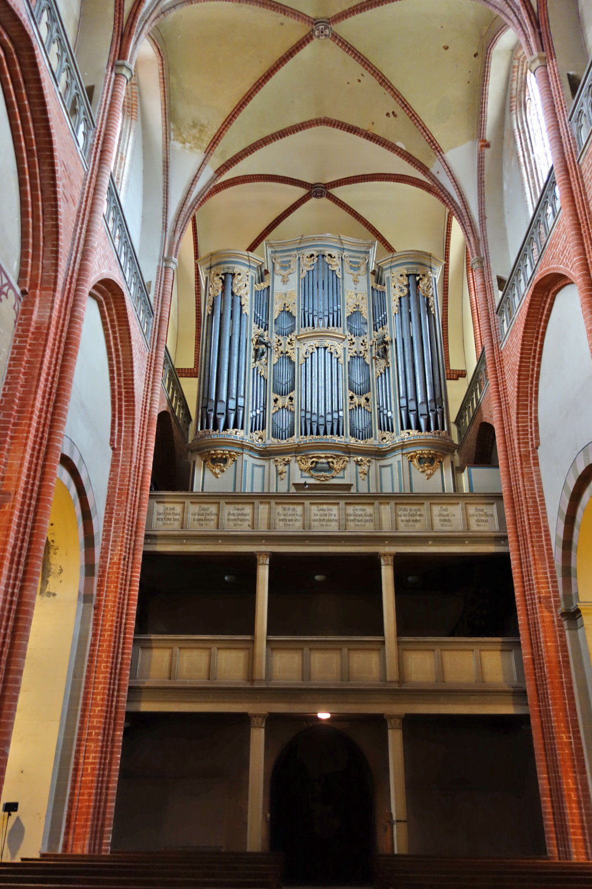 Orgel Havelberg, Dom, Niedersachsen